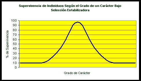 Supervivencia de Individuos Según el Grado de un Carácter Bajo Selección Estabilizadora